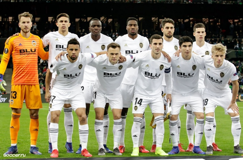 Alineació del València CF en el partit d'Europa League contra el Krasnodar, 2019.